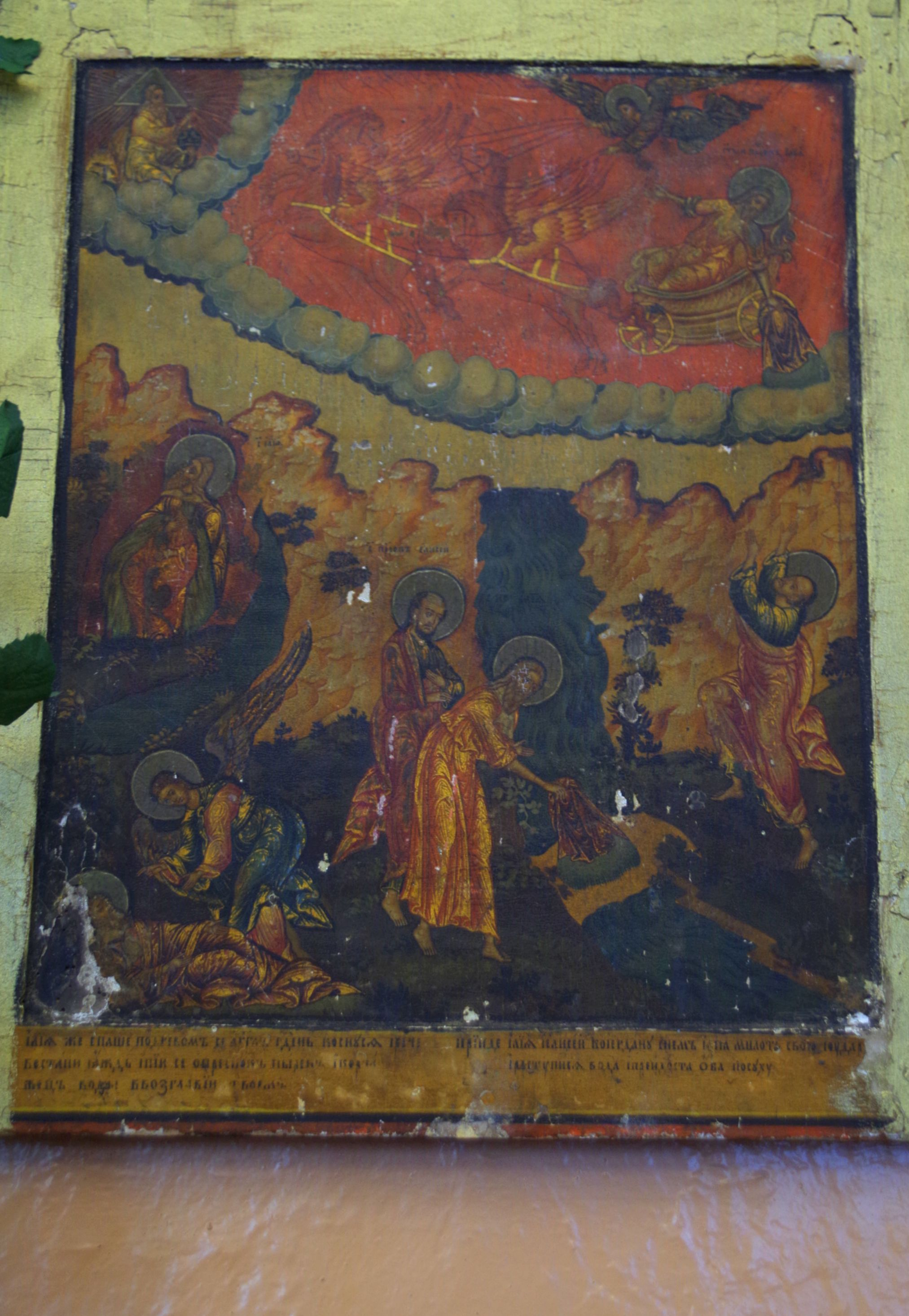 Ikoon "Prohvet Elias" , 19.saj. II pool (tempera, puit)